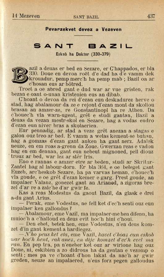 Abad Perrot. Bue ar Zent. 437